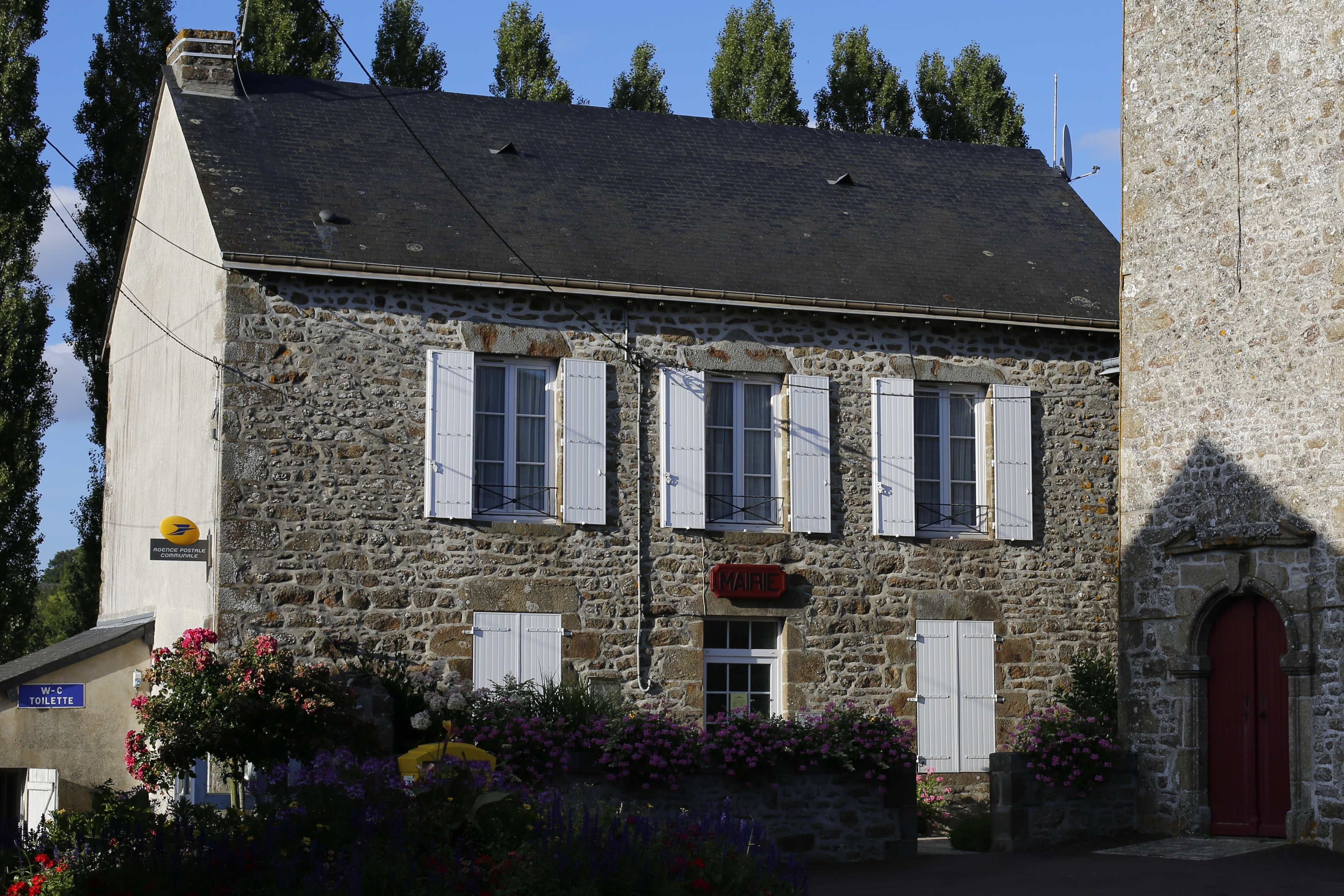 Mairie d'Izé.